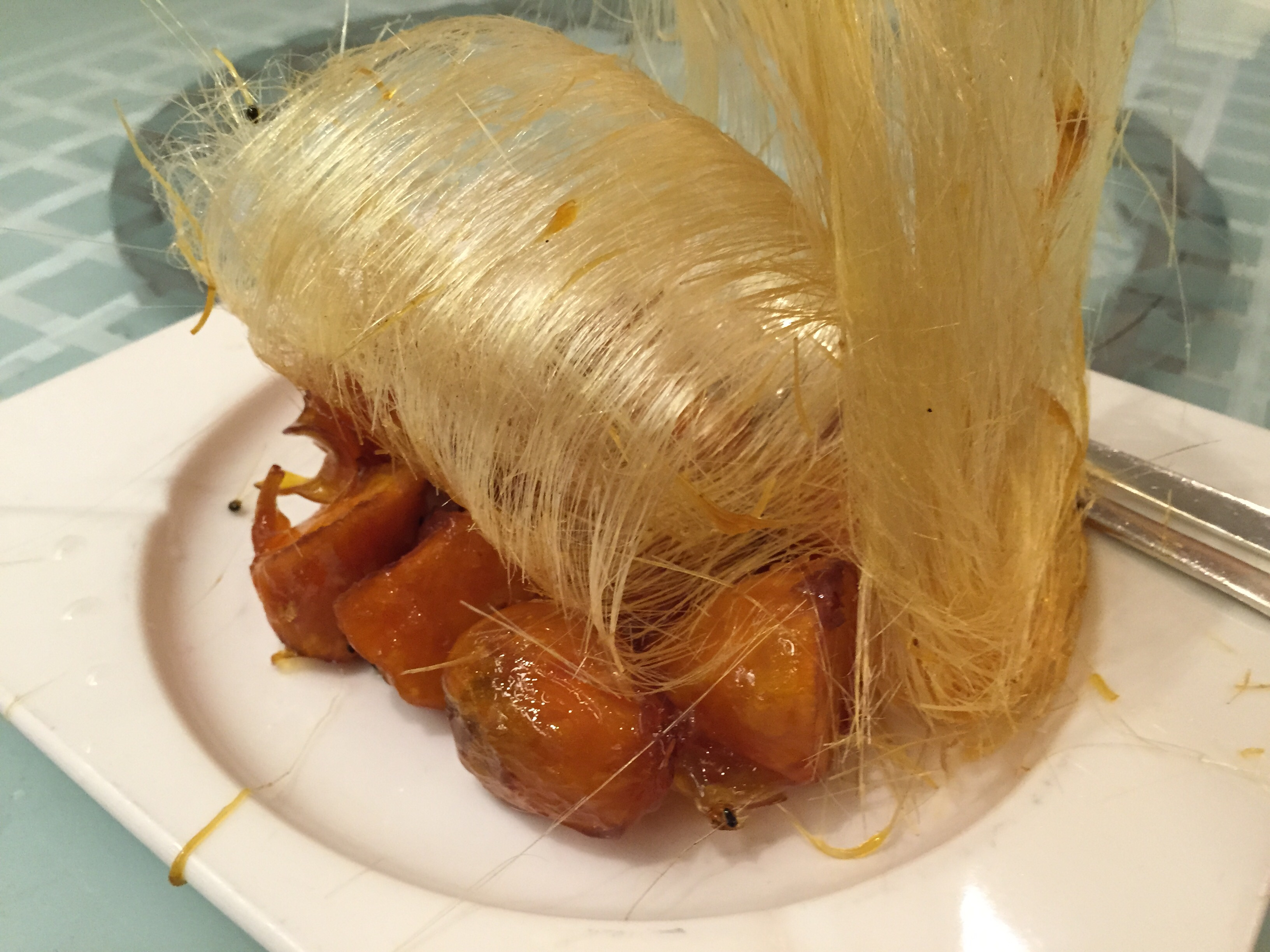 地瓜拔絲, Yi Yuan Peking Cuisine, The Westin Taipei, 頤園, 頤園北京料理, 六福皇宮, 台北威斯汀六福皇宮, 台北